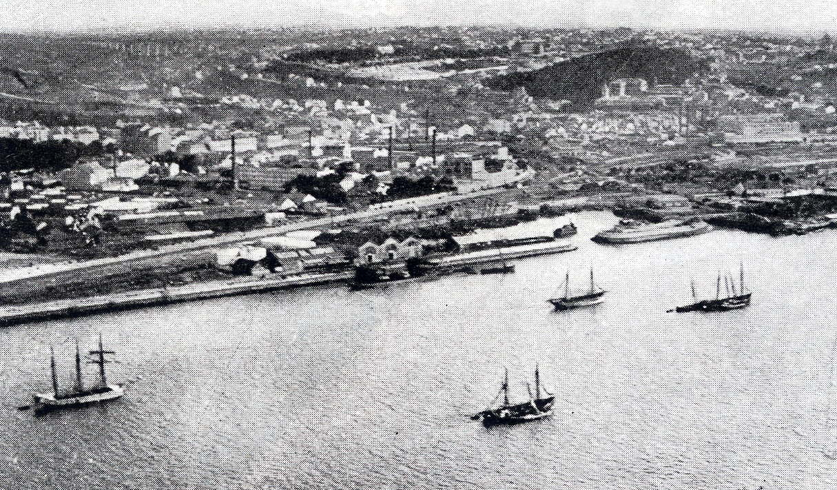 Doca do Bom Sucesso em Lisboa, onde se encontrava a escola de aviação marítima.